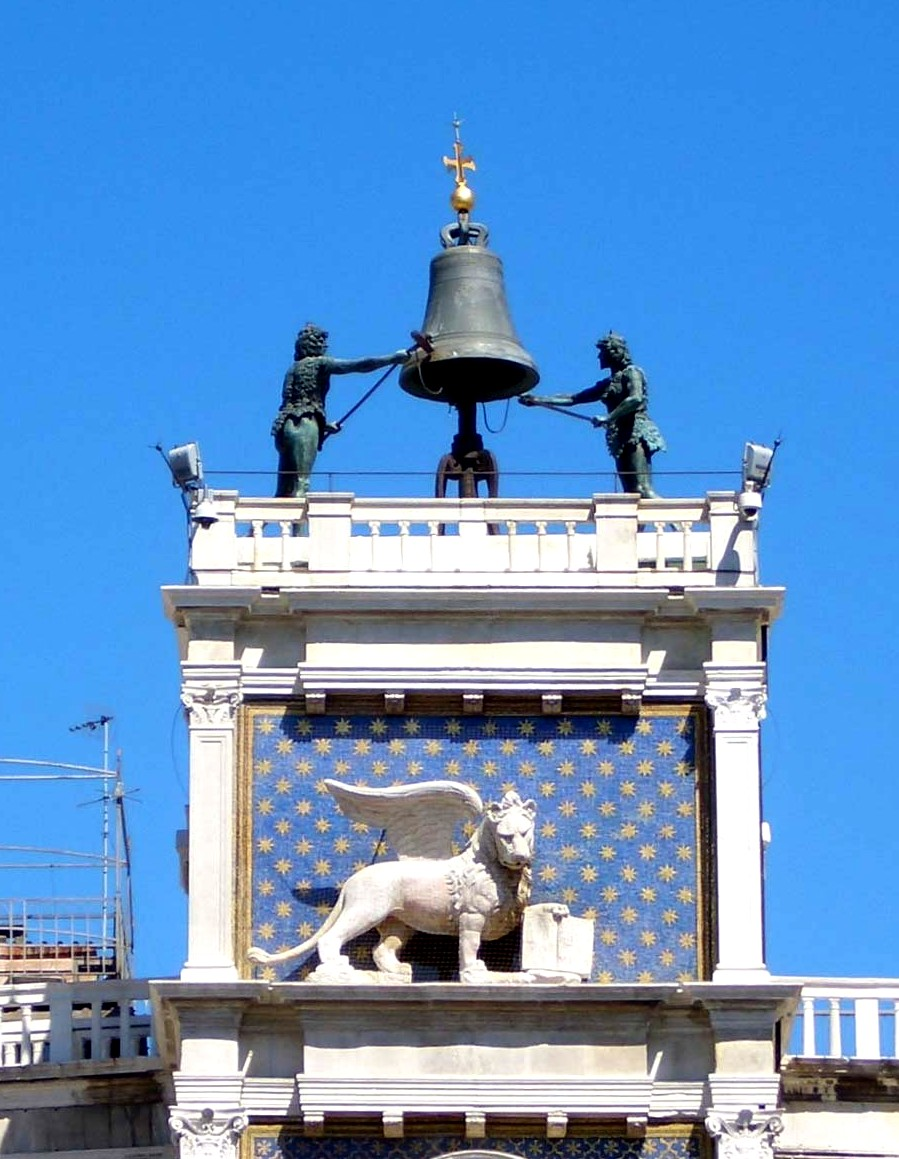 Terrazza dei Mori soprastante la Torre dell'orologio in Piazza San Marco - Venezia